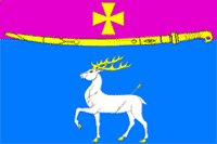 Флаг Динского сельского поселения, Краснодарский край, Россия.